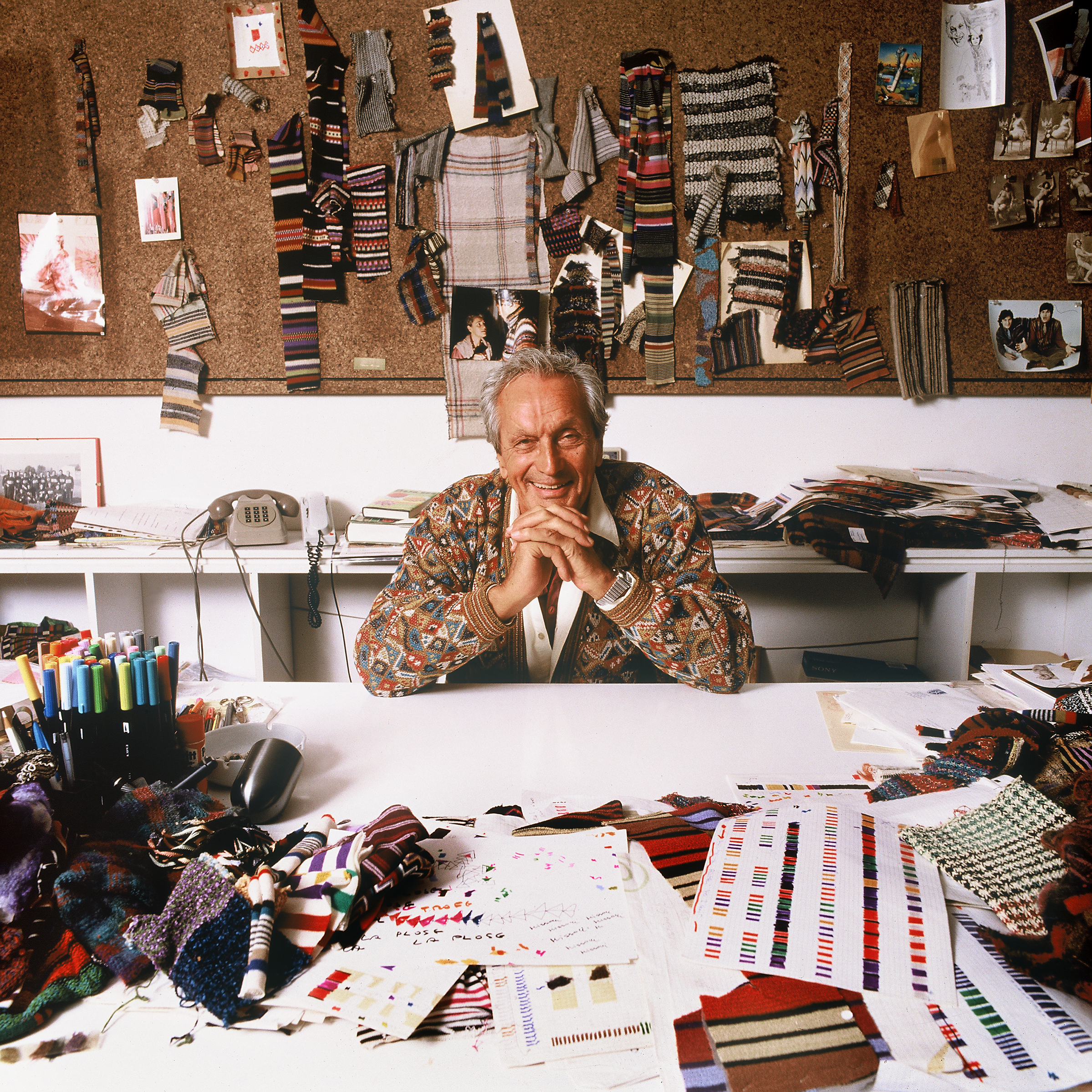 Lo stilista Ottavio Missoni ritratto nel suo studio di Sumirago, presso la sede della Missoni S.p.A.